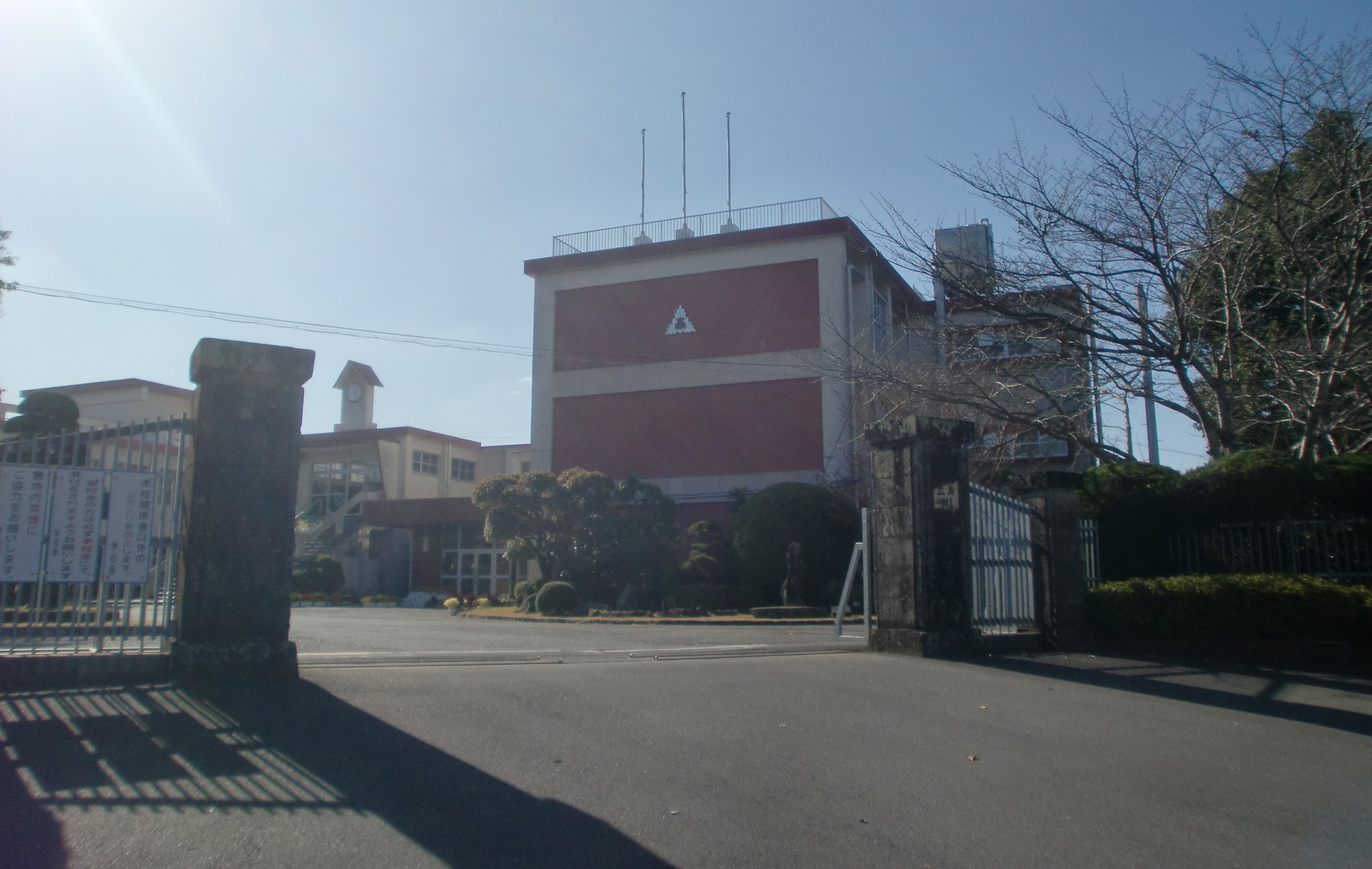 鹿児島県立川辺高等学校の外観。